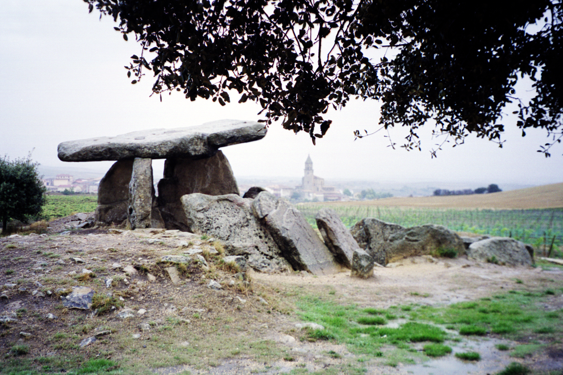 Dolmen de Elvillar, en Álava (España)